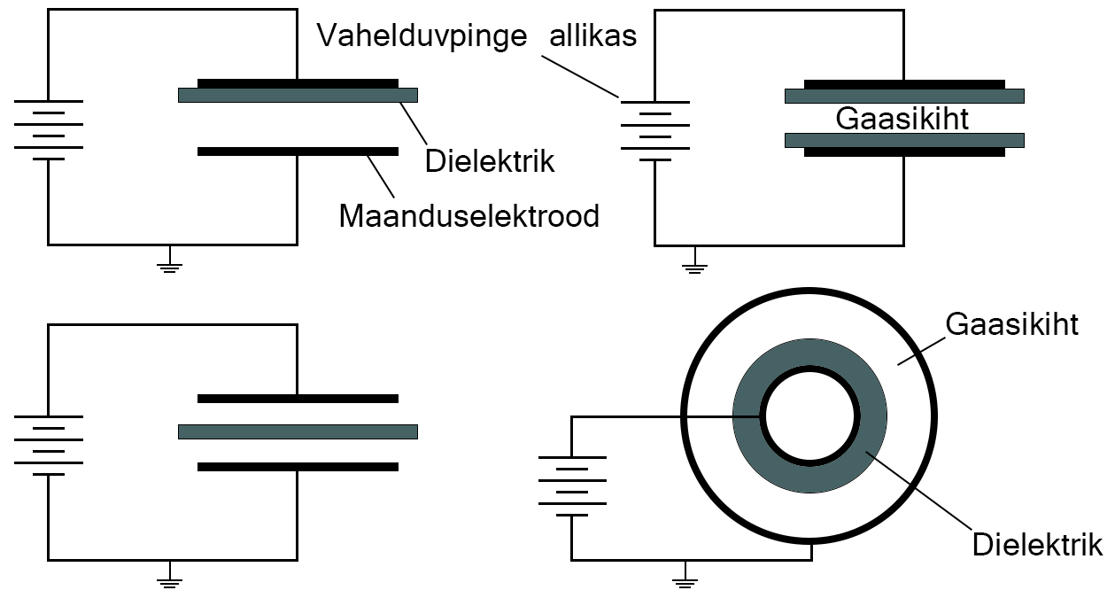 Dielektrik-barjäärlahenduse ehituse tüübid